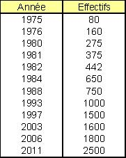 Evolution des effectifs de l'école spéciale de Brazzaville